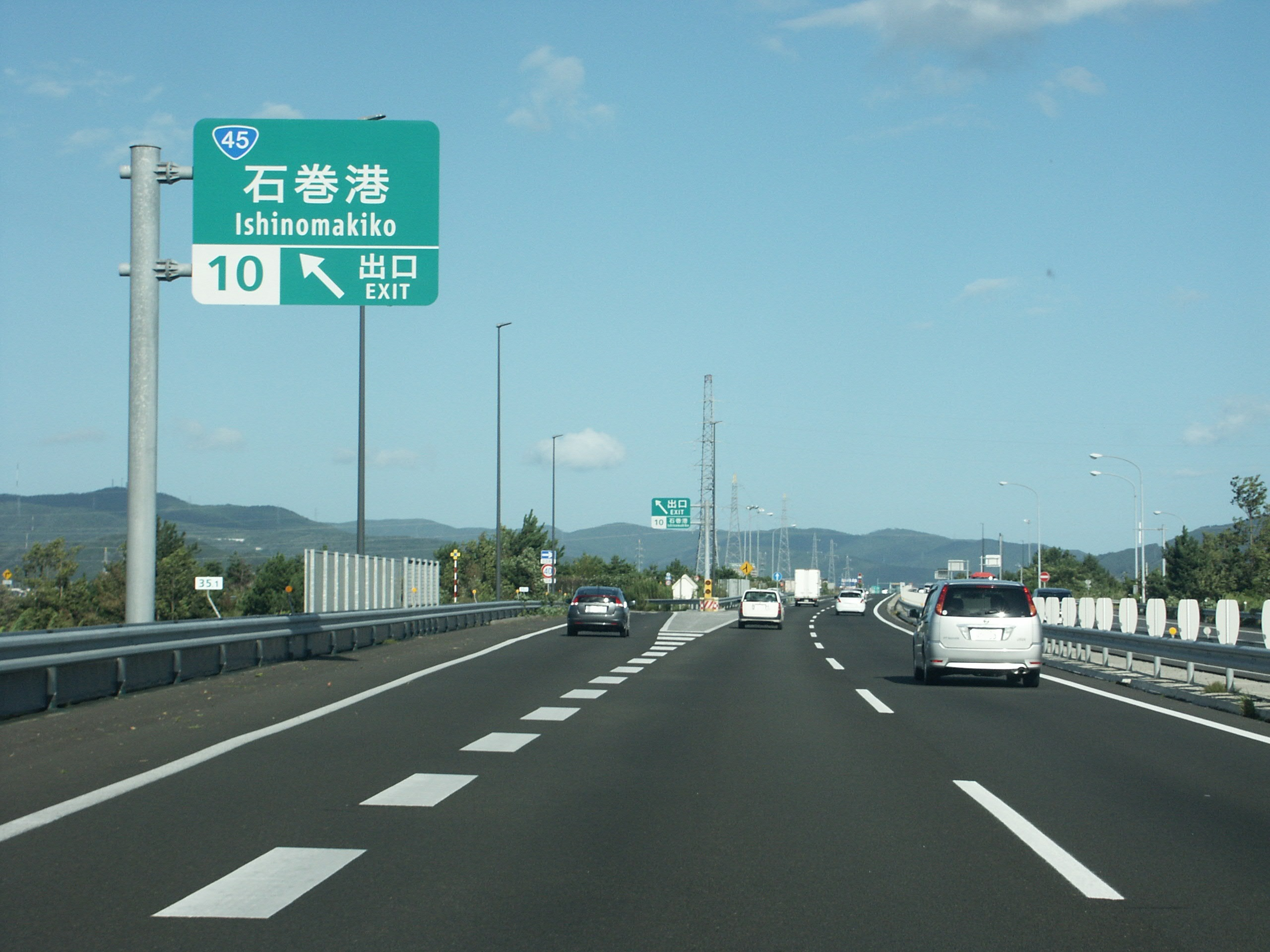 三陸自動車道石巻港IC 出口付近（利府JCT方面側）